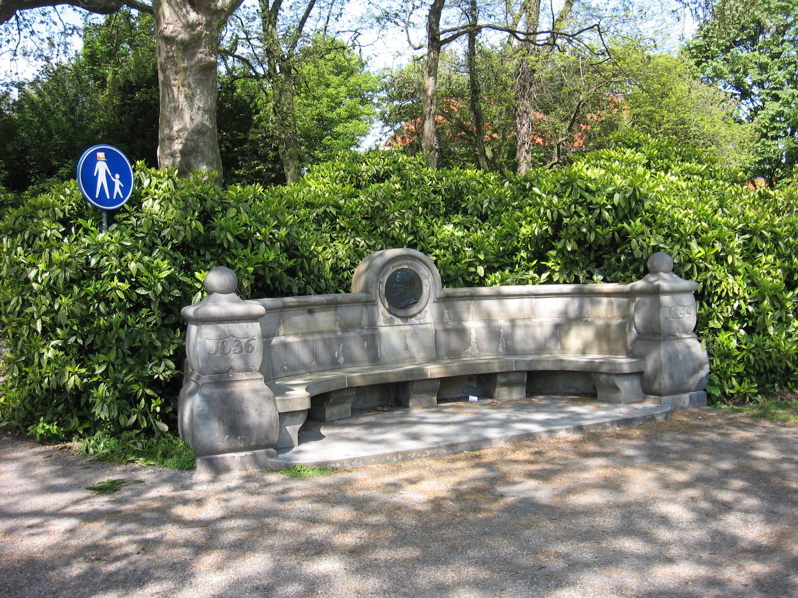 Delft - Zitbank ter nagedachtenis aan professor Adrien Huet.jpg, rijksmonument (Kalverbos)